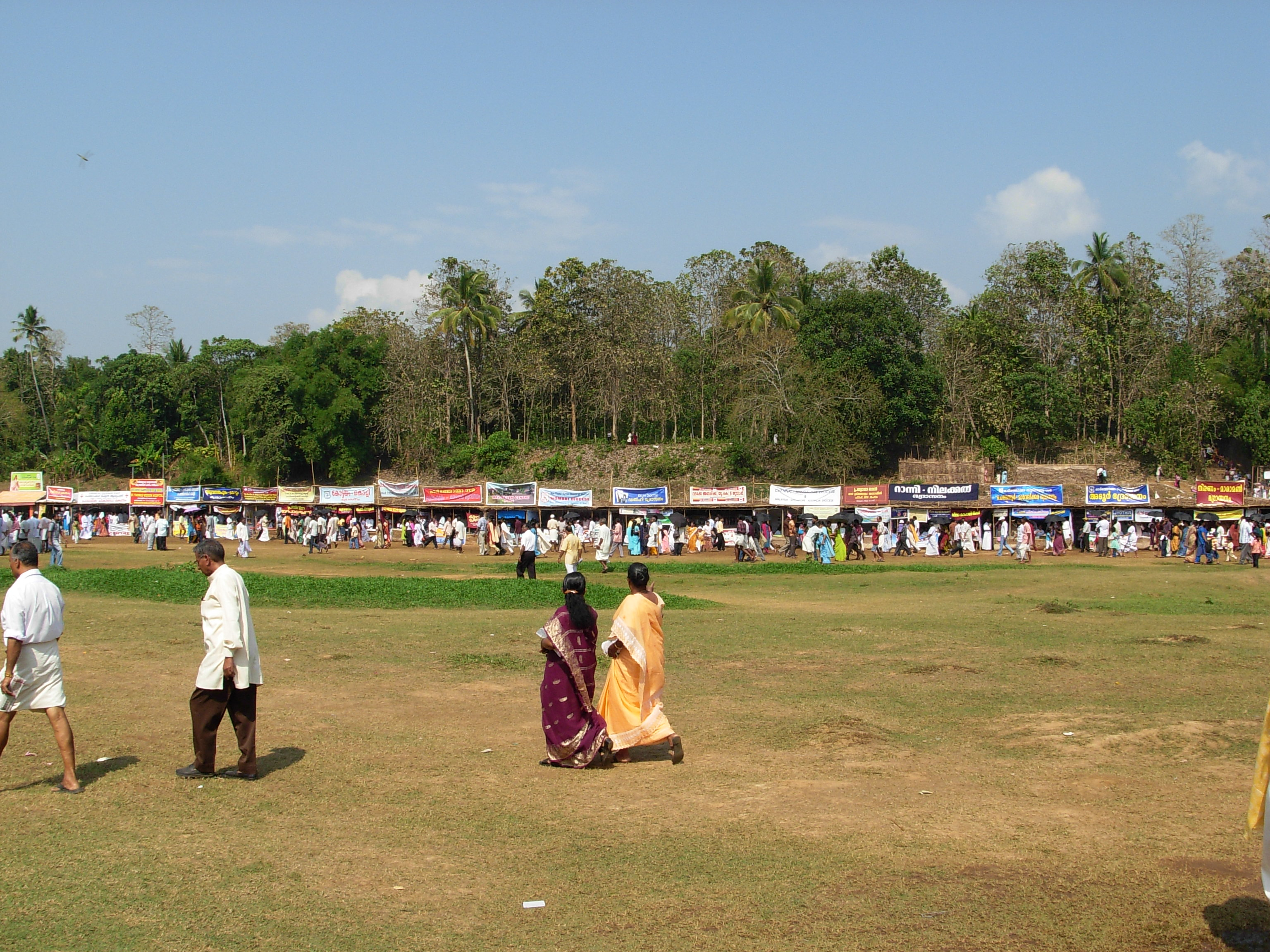 മാരാമണിലെ സ്റ്റാളുകൾ